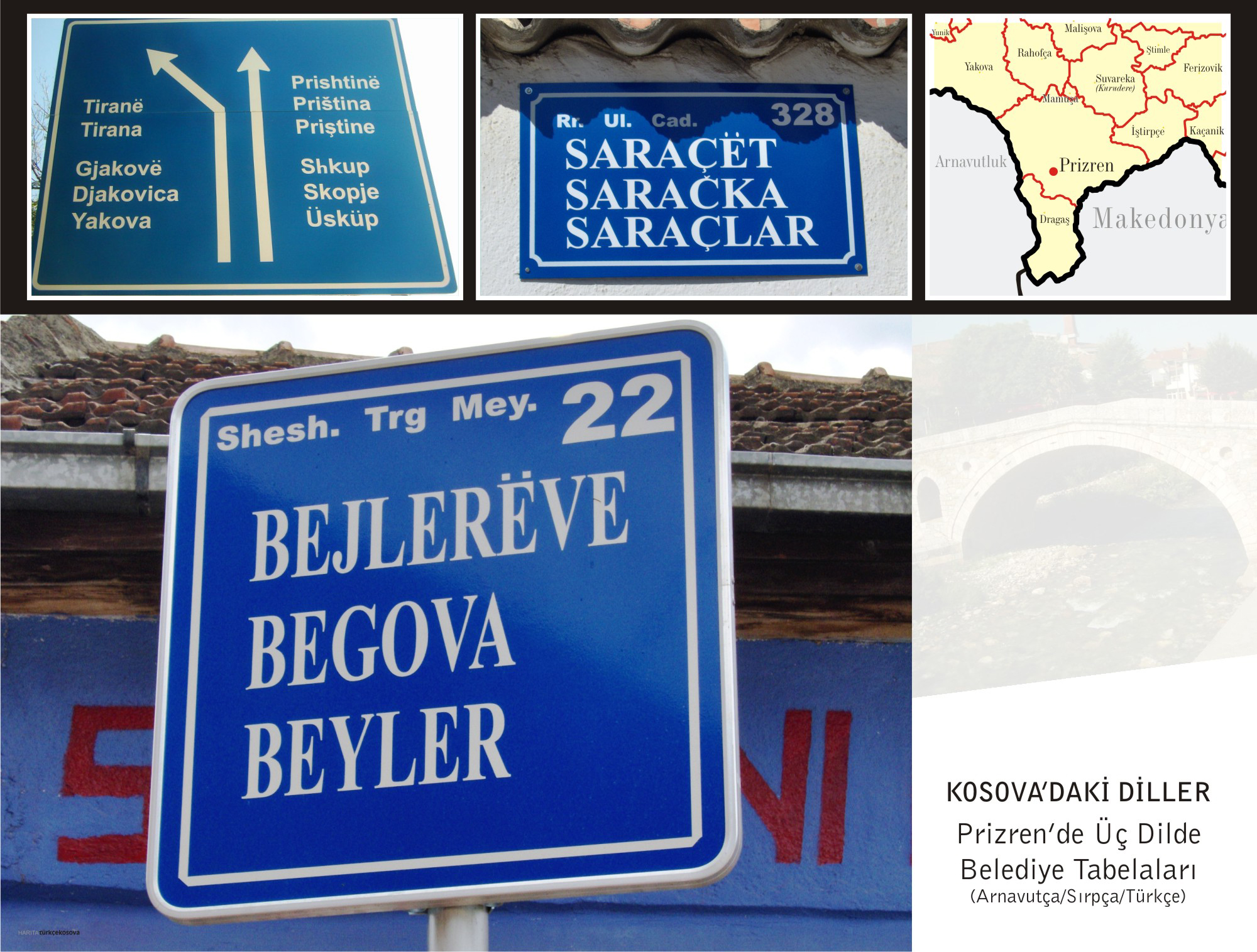 diğer_sürümler